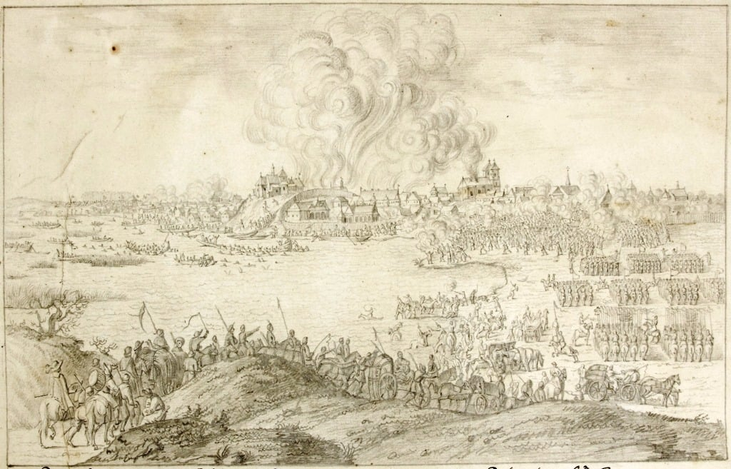 Беларуская (тарашкевіца): Бабруйск (Babrujsk). Узяцьце места і замка войскамі Януша Радзівіла Puga Janusij XI Ducis Radzivily cum krzyczevianis rebellibus Cosacis ad Bobroyskom anno 1649